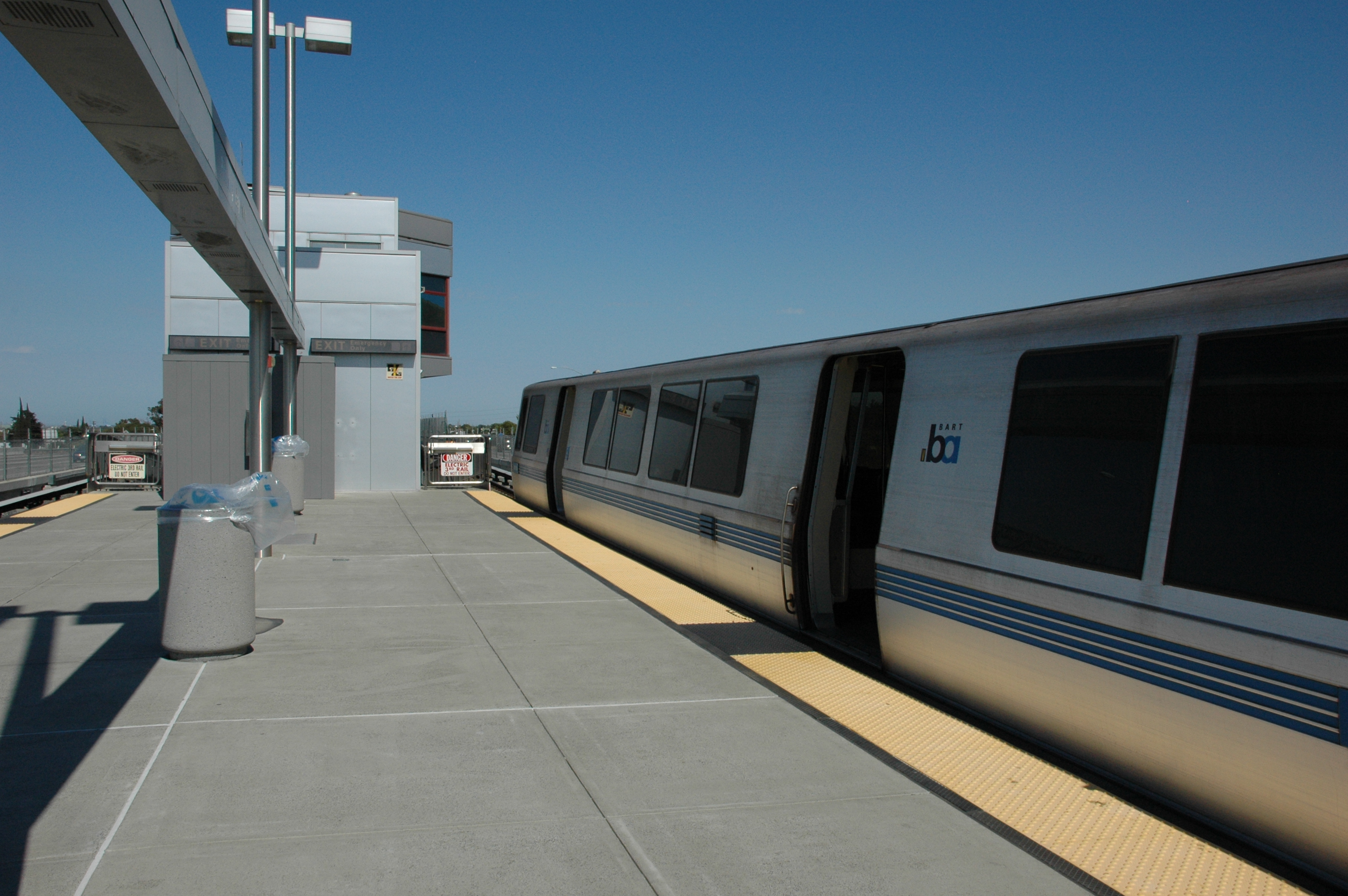 PBBP BART